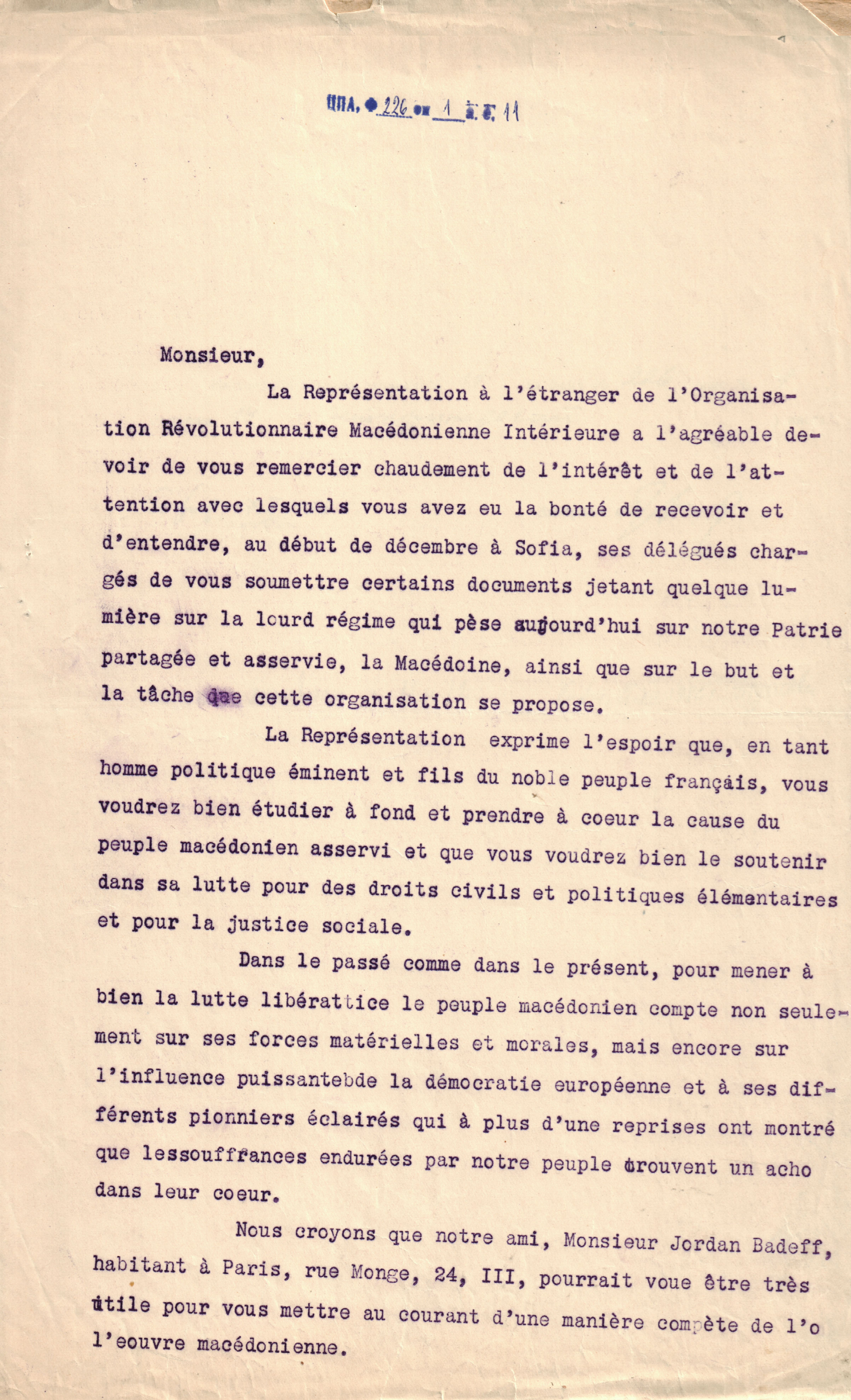 Писма, прокламации и бележки на ЦК и ЗП на ВМРО-благодарствено писмо до Анри Барбюс, взаимоотношениата с българското правителство, разпределение на работата между сътрудниците в ЗП и др.